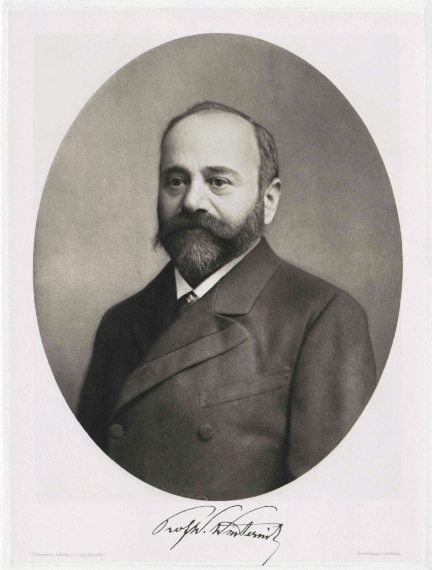 Wilhelm Winternitz (1834–1917)